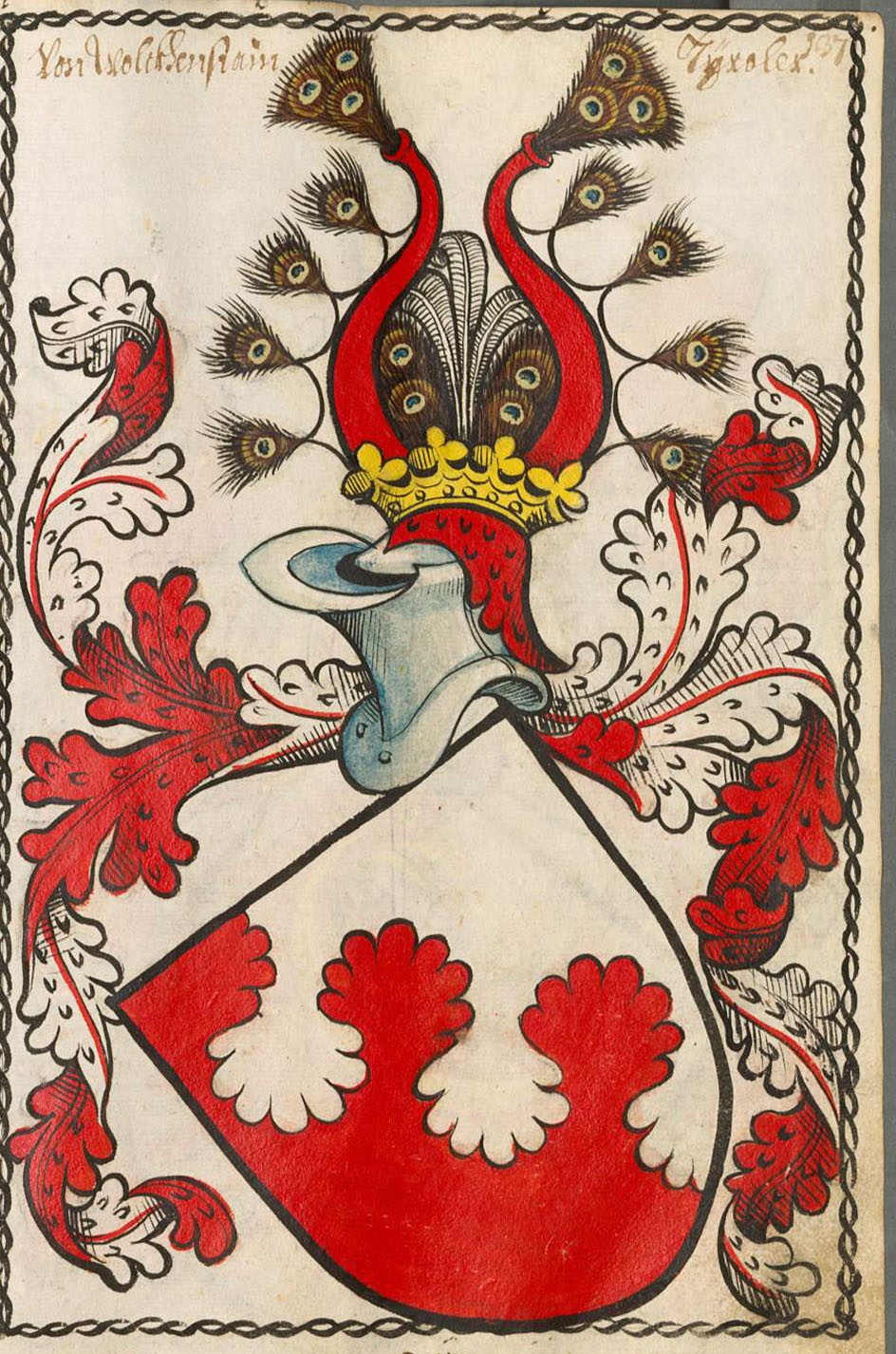 Scheibler'sches Wappenbuch , älterer Teil Tiroler Wolkenstein